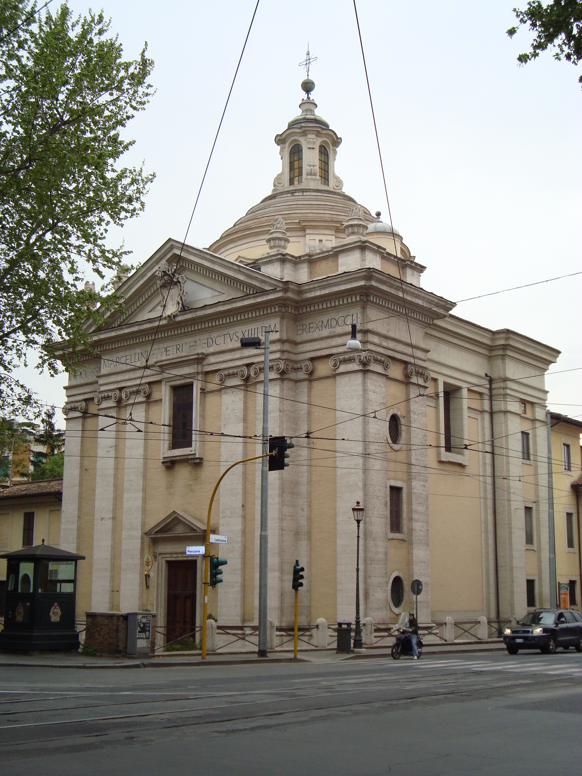 L'église Santi Marcellino e Pietro al Laterano de Rome